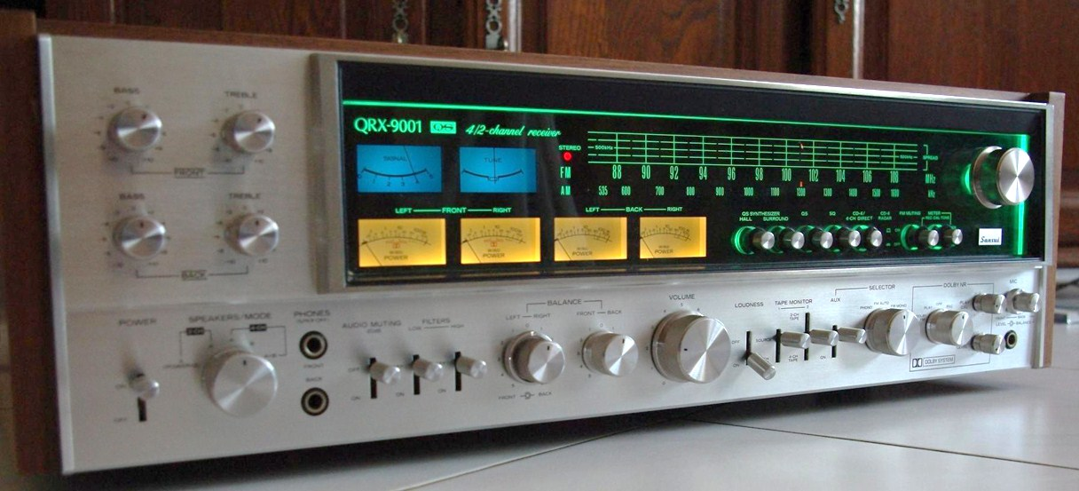 Récepteur Tuner Amplificateur Quadriphonique QRX-9001